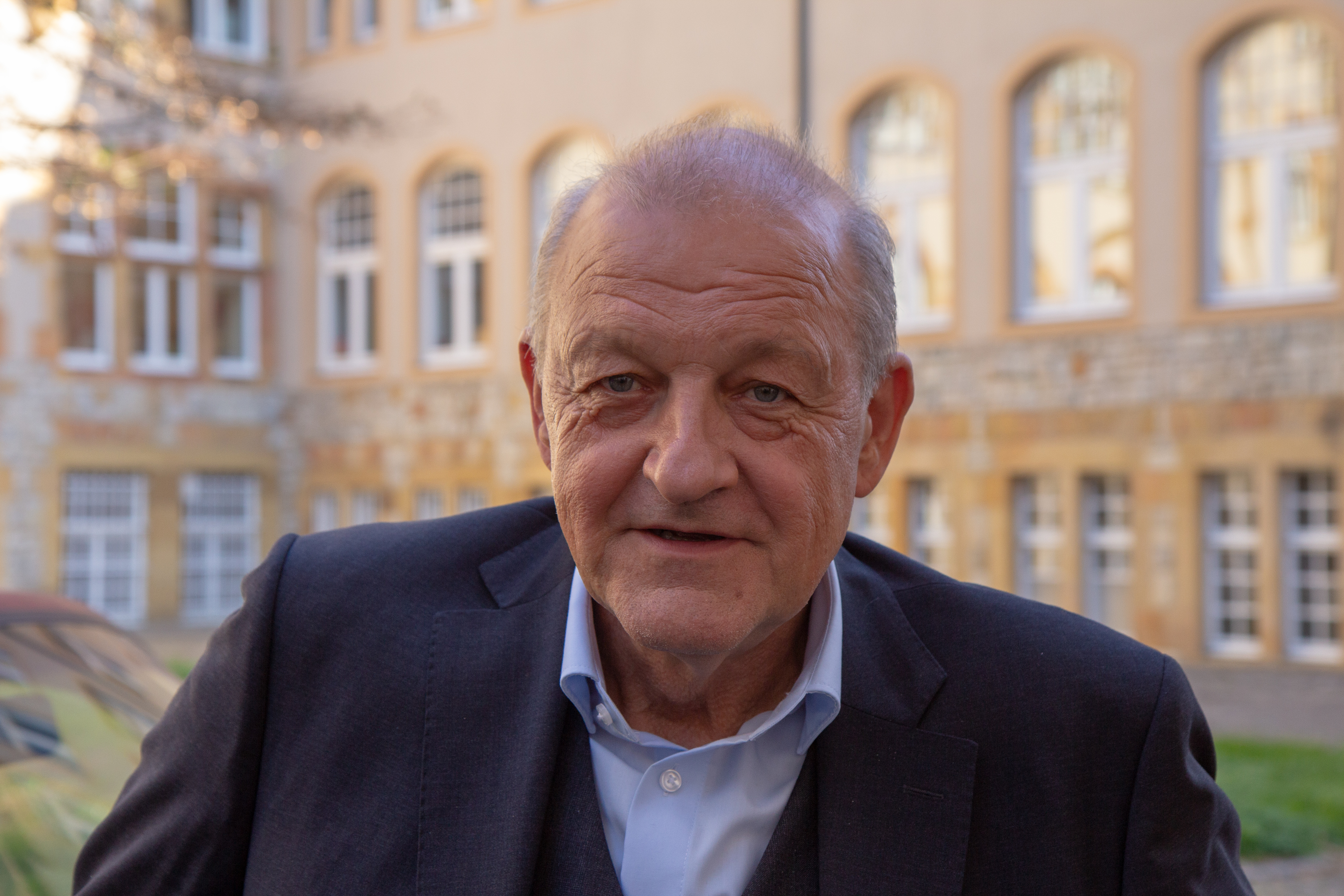 Pressetermin am Set "Wilsberg" am Alten Rathaus in Bielefeld am 15. Oktober 2018. Schauspieler: Leonhard Landsink